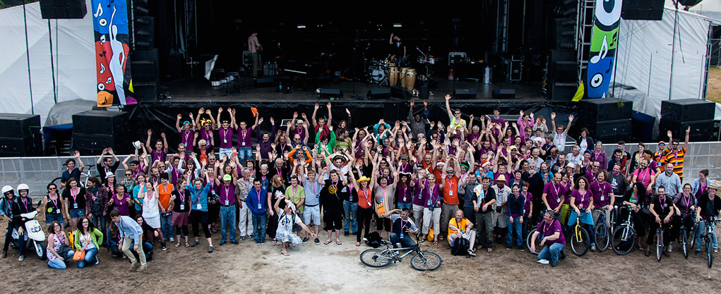 1630 Bénévoles